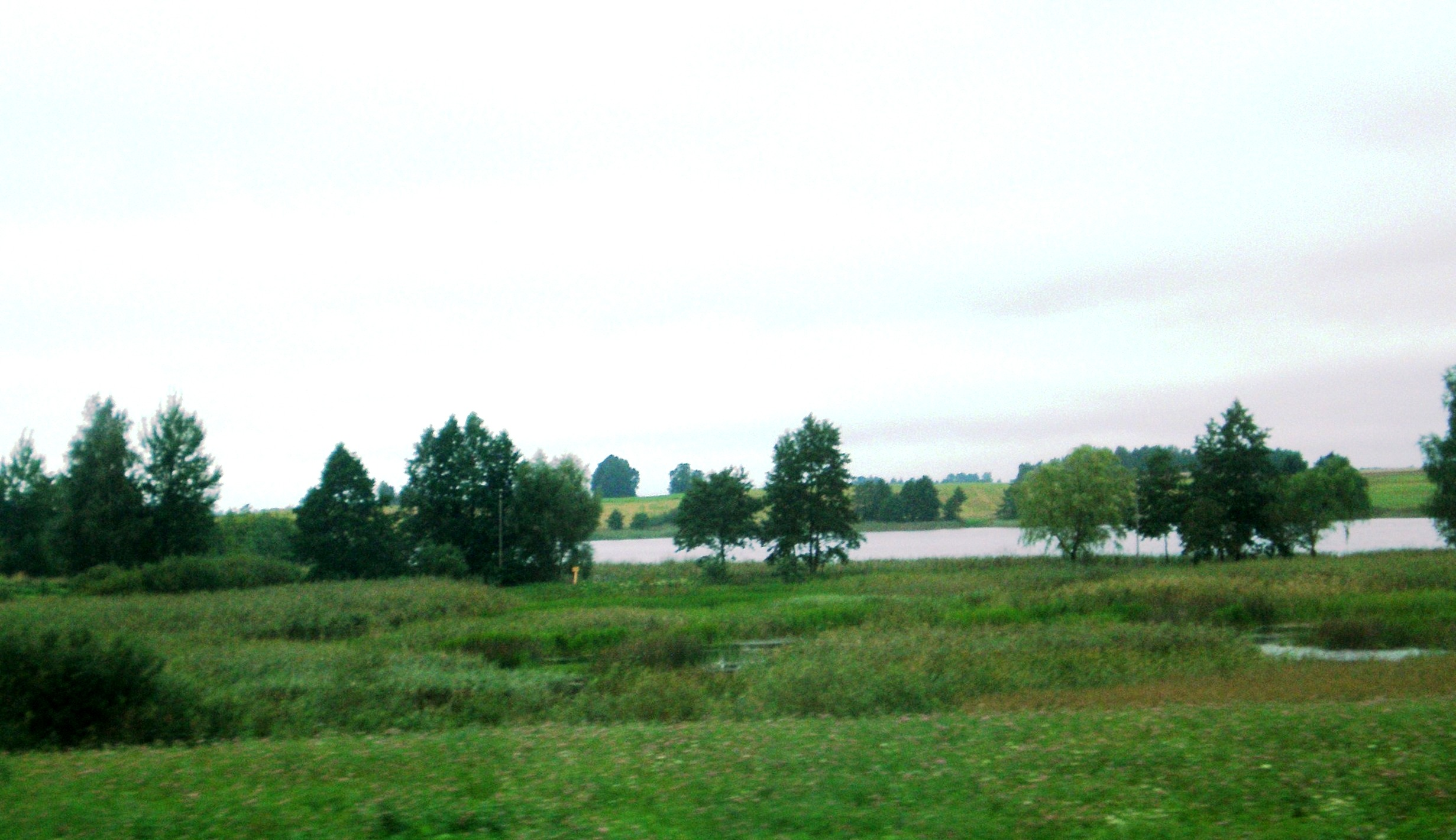 Leciškių ežeras, Marijampolės sav.